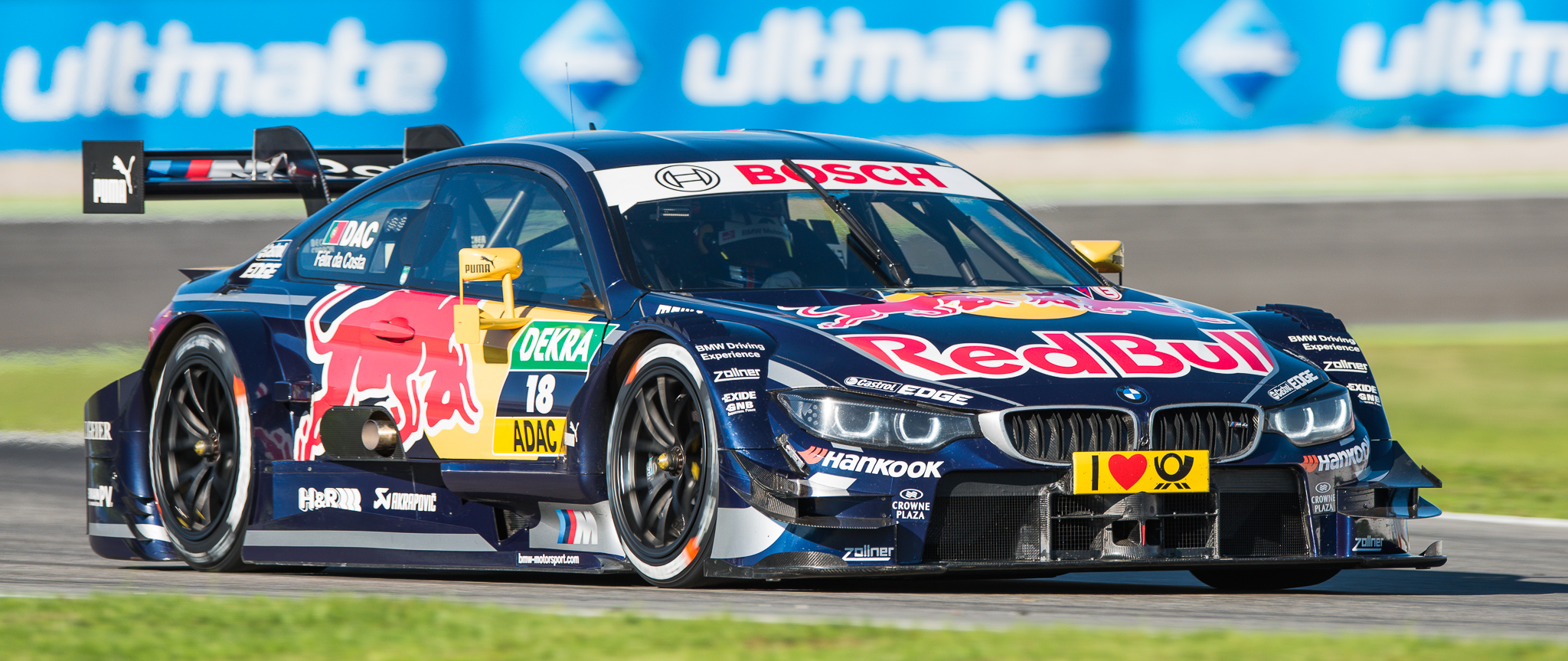 Antonio Felix da Costa,DTM,Deutsche Tourenwagen Masters,Hockenheimring,MTEK GmbH,Motorsport,Red Bull BMW M4 DTM